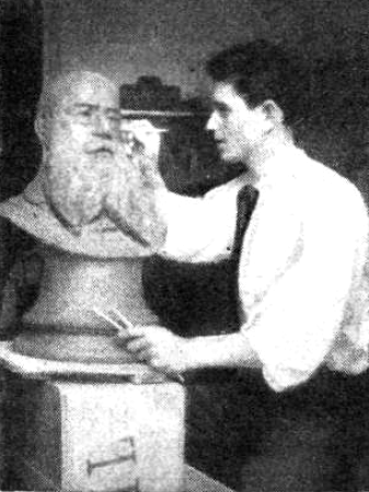 El joven estudiante español José Manuel Puelles de los Santos realizando un busto de Federico Rubio en 1912